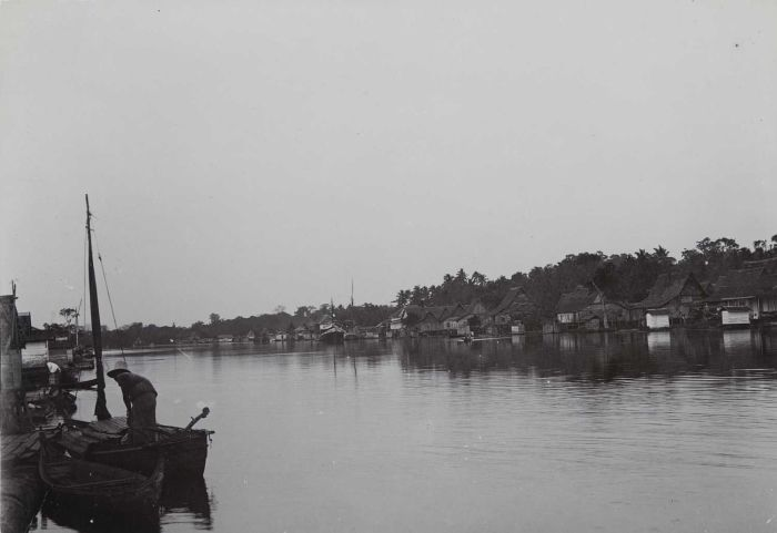 foto. Gezicht op Pangkalanboeoen aan de rivier Arut